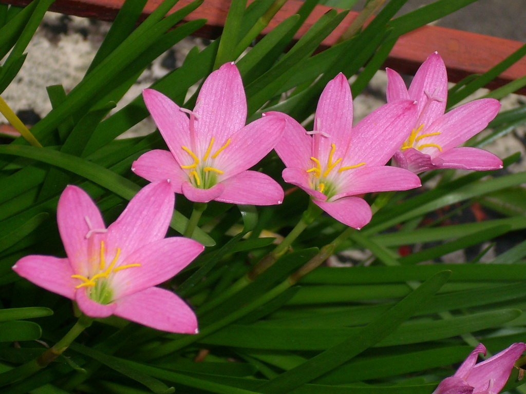 Rain Lily-pink variety